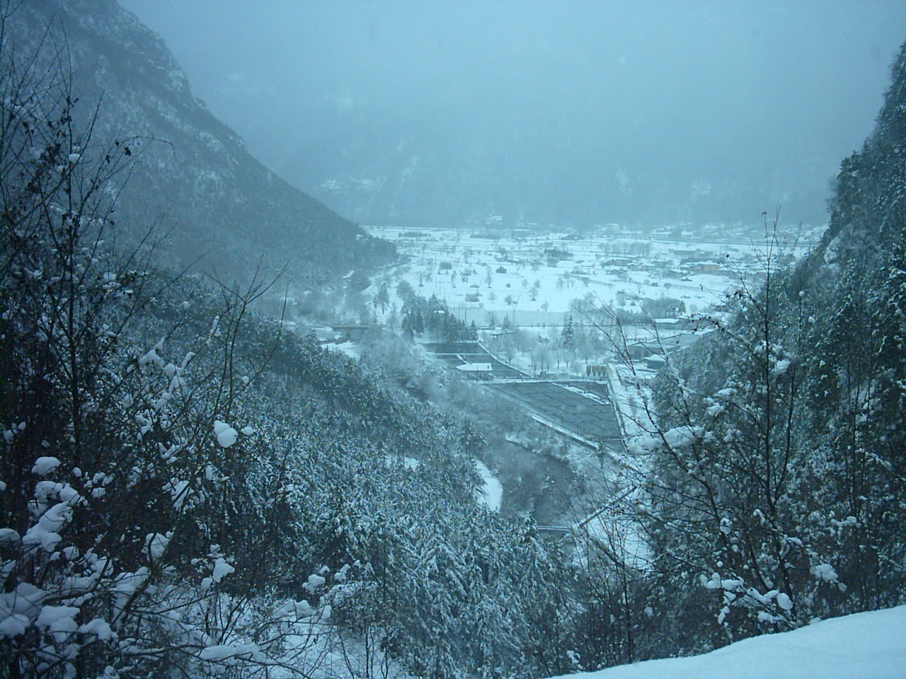 Il torrente Palvico a Storo visto dalla SS240 nel punto attraversato dalla condotta forzata a servizio della centrale idroelettrica. Sulla destra si vede una piscicoltura (itticoltura)